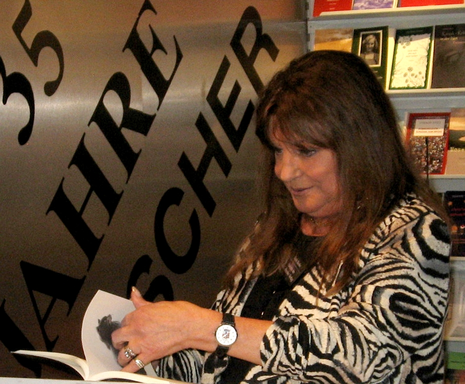 Uschi Nerke während einer Lesung auf der Frankfurter Buchmesse.